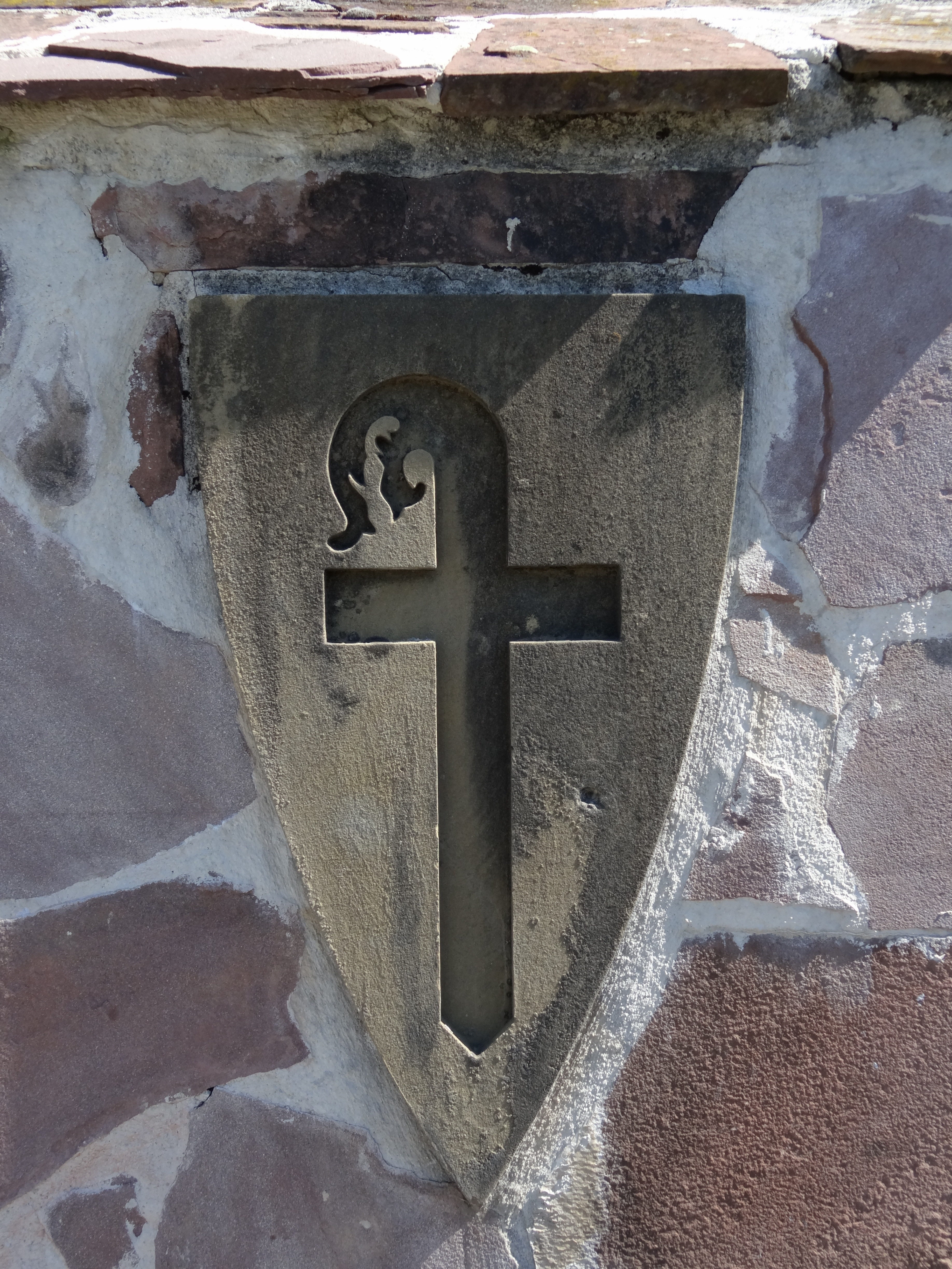 Colegiata de Santa María (Roncesvalles)